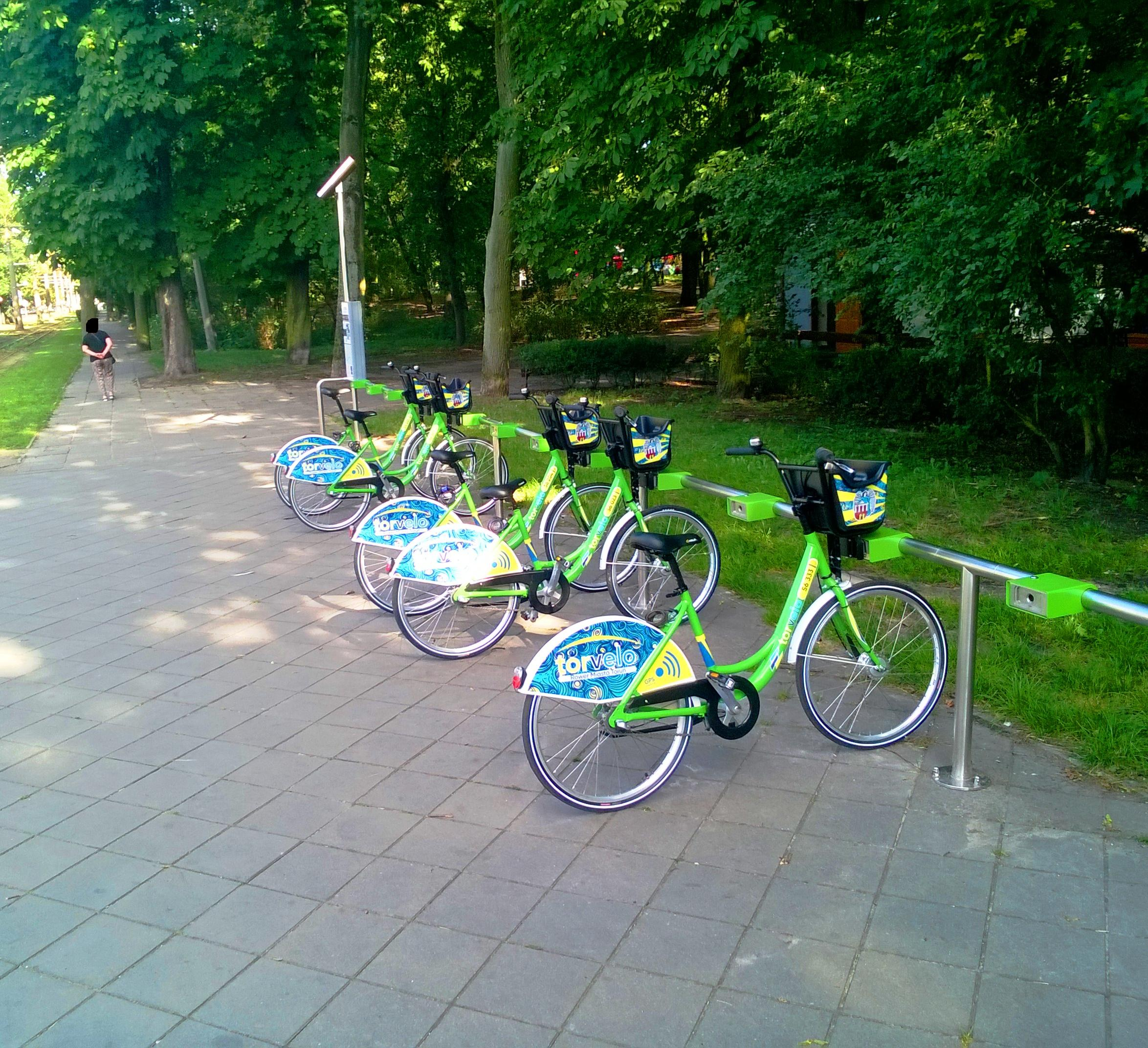 Torvelo w Toruniu37